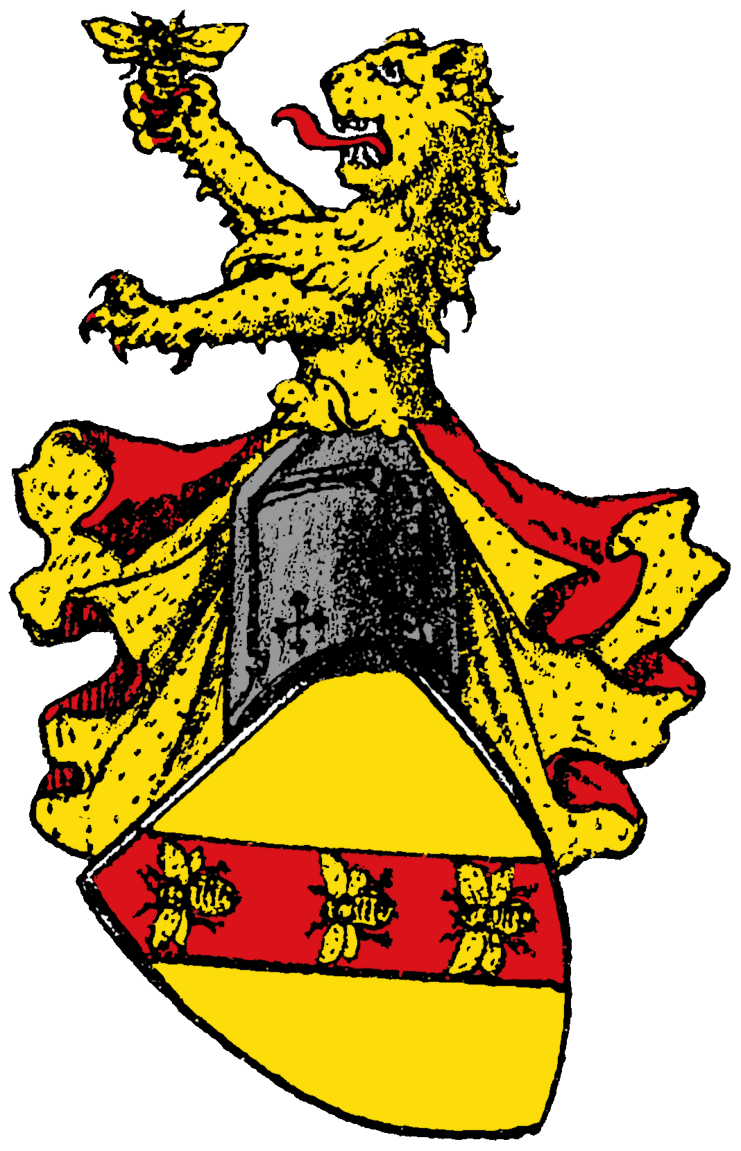 Wappen der Familie Immel. Blasonierung: „Wappen: im g(oldenen) Schild ein r(oter) Rechtsschrägbalken, in diesem hintereinander drei fliegende g(oldene) Bienen (Immen). Helm: wachs(ender) g(oldener) Löwe. Decken: g(old) r(ot)“ (Seite 12)